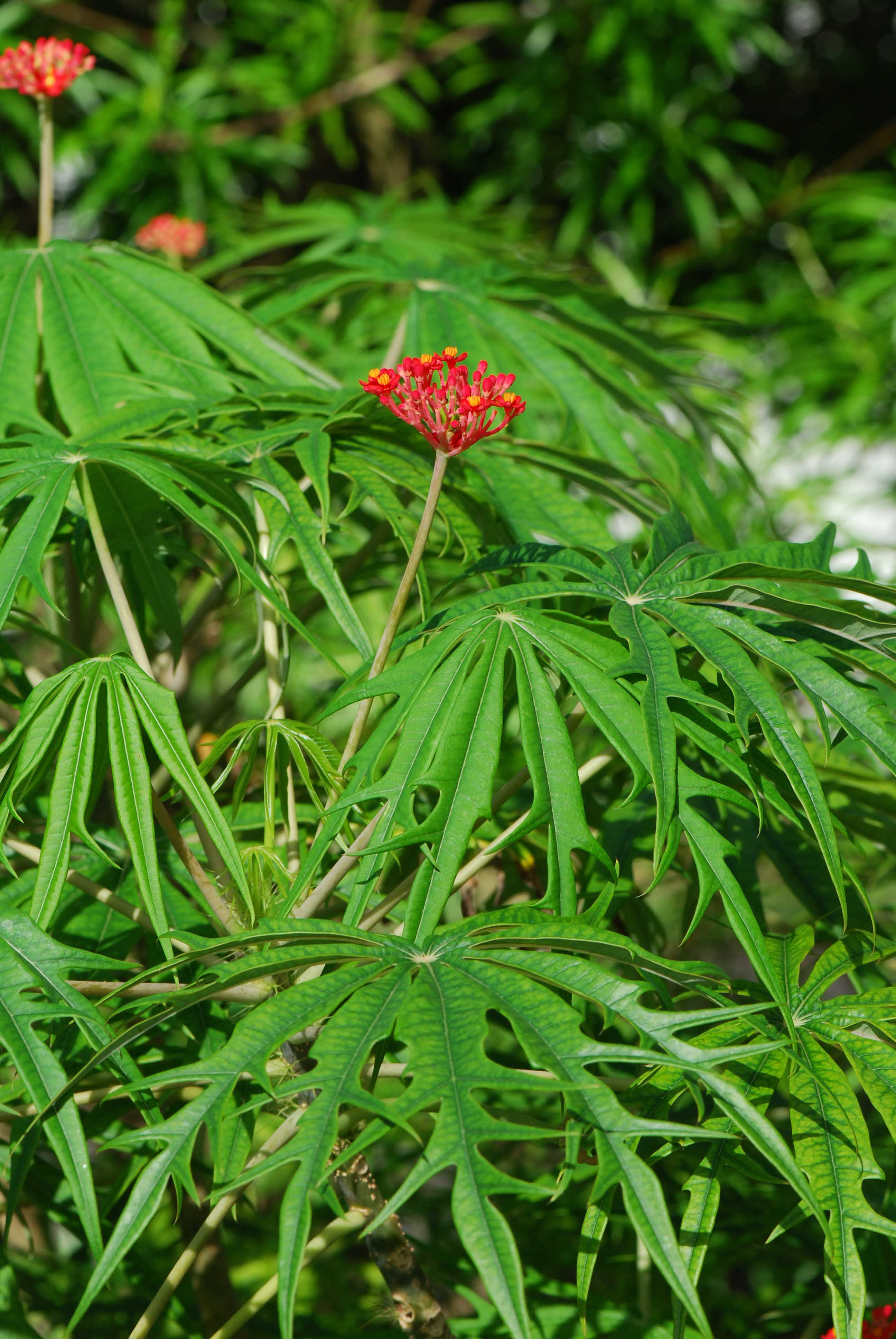 Jatropha multifida, Corail, île Maurice